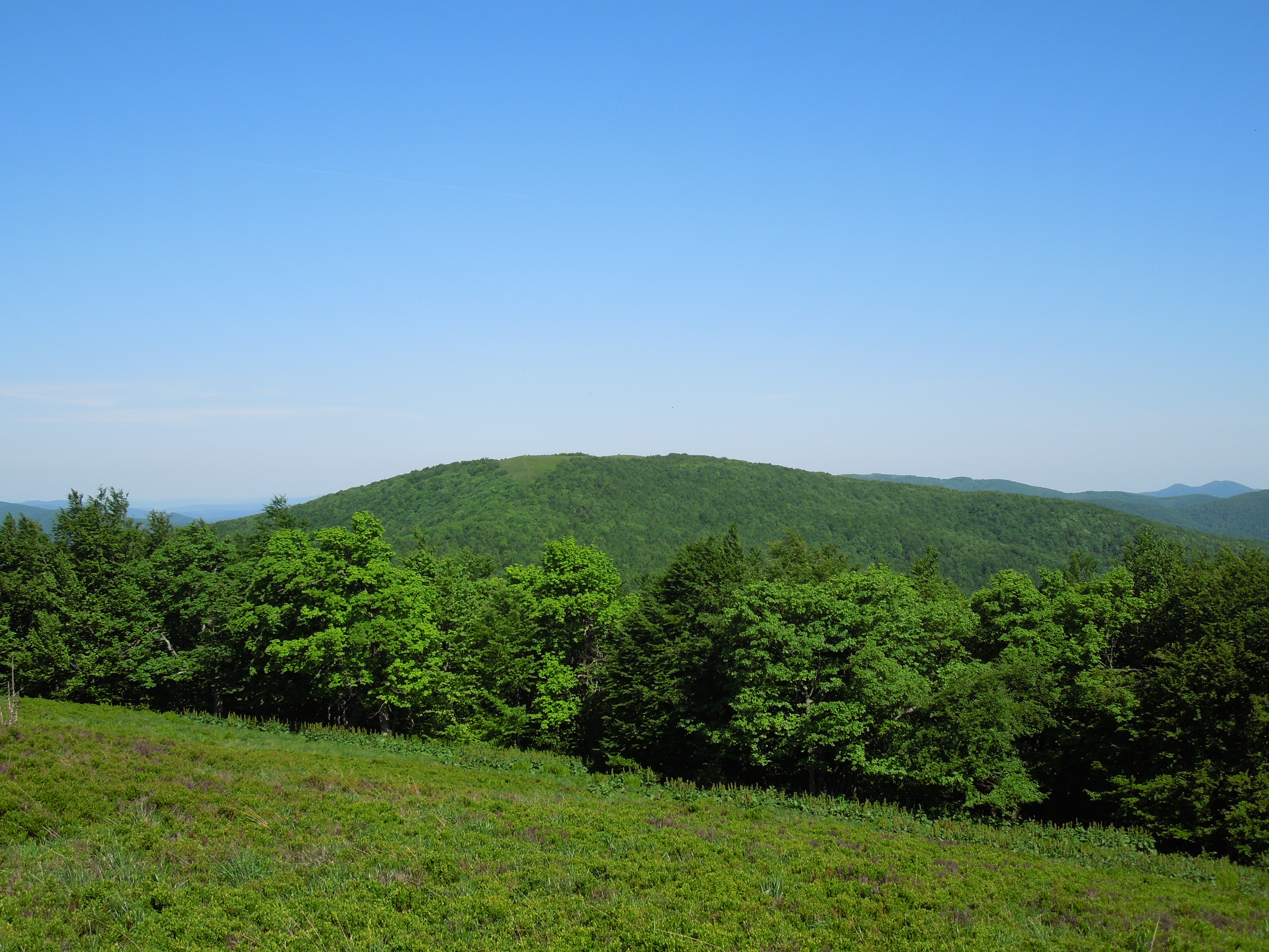 Pohľad na Pľašu z turistického chodníka smerujúceho od Ďurkovca v júni